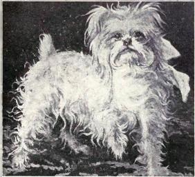 Bolognese from 1915